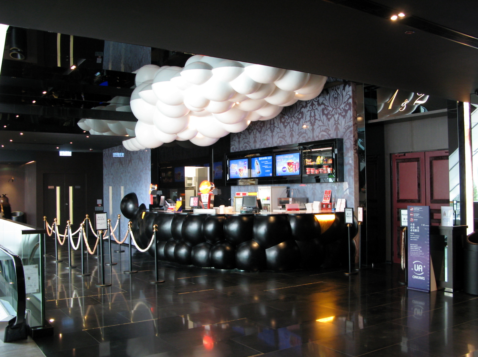 UA iSQUARE Interior